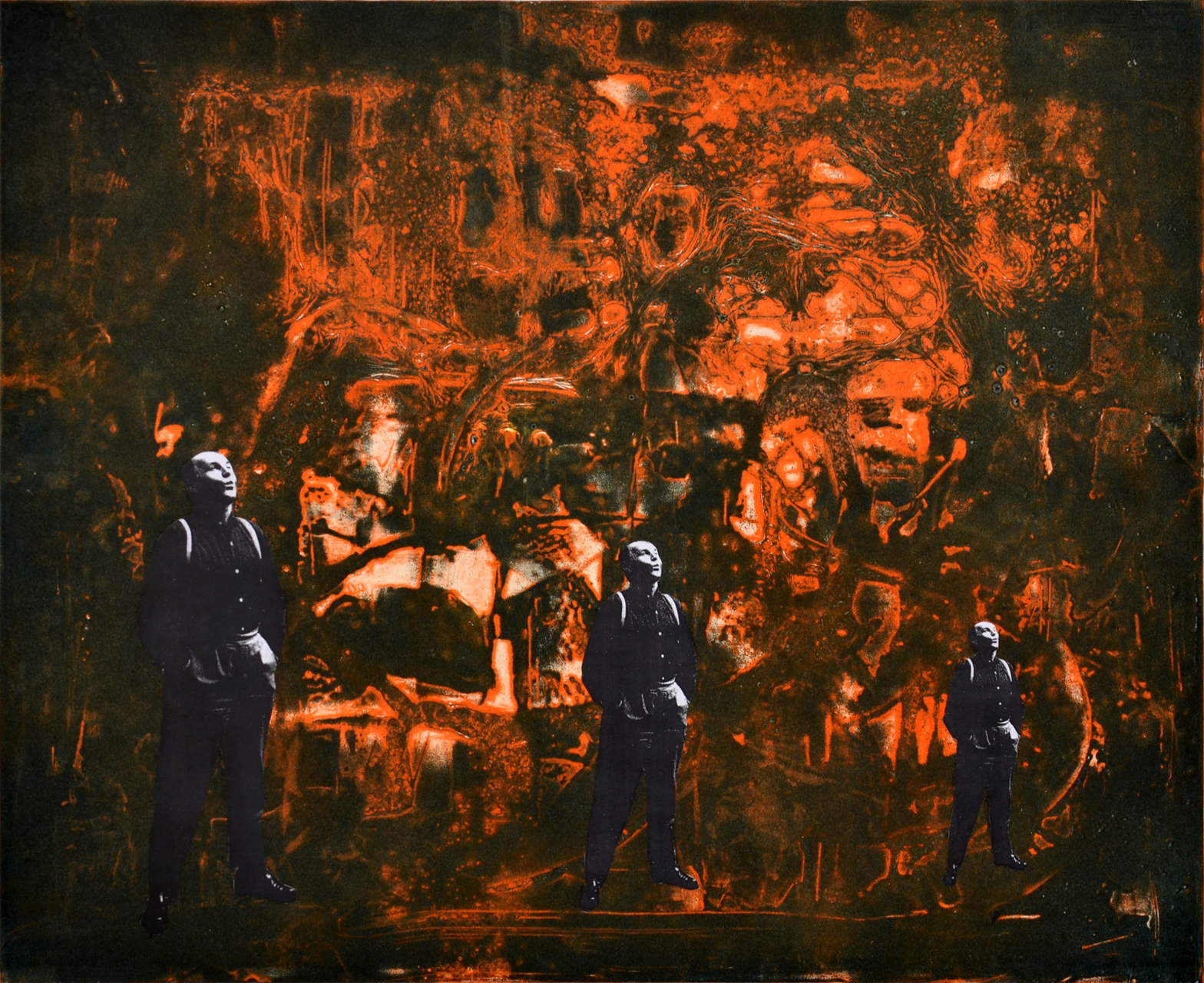 Oldřich Hamera, Krásná Poldi, strukturální monotyp a koláž, 37,5x46,5 cm, 2013